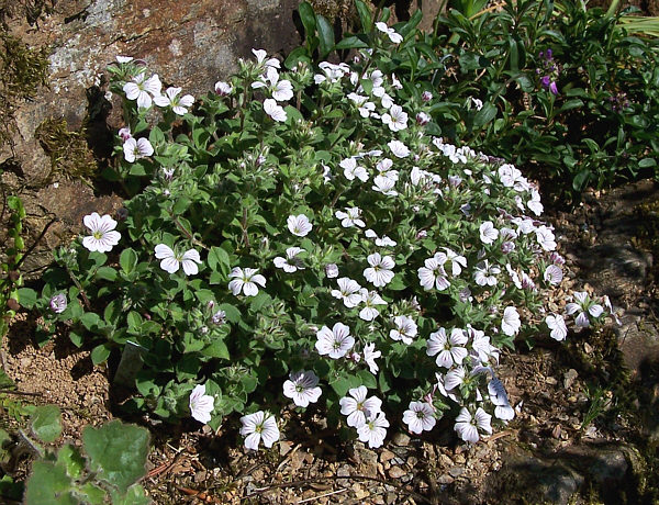 Plante en tapis de 10 cm de haut, du Buthan au Pakistan sur étendues rocheuses entre 1200 et 4700 m. (photo en culture)